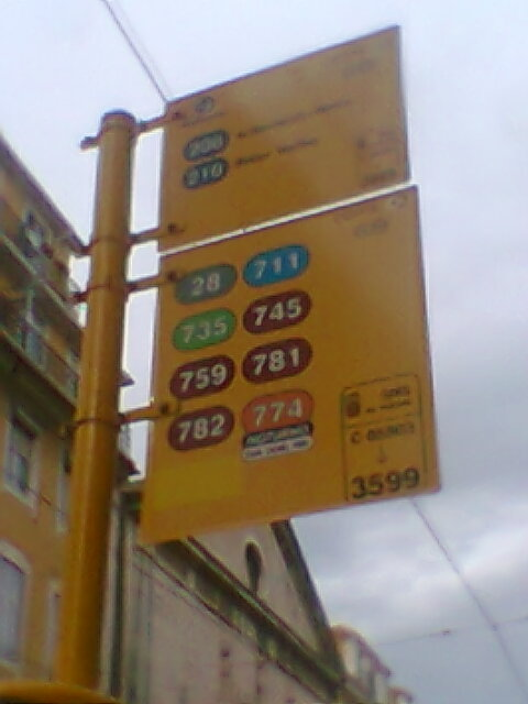 Paragem de autocarro, em Lisboa, servindo um número invulgarmente alto de carreiras: dez. Note-se as carreiras noturnas em bandeira separada, o ícone denotando o estatuto especial da 779, e a co-existência de carreiras pré- e pós- Rede7. This photo is taken with a Nokia C1-01 handset.